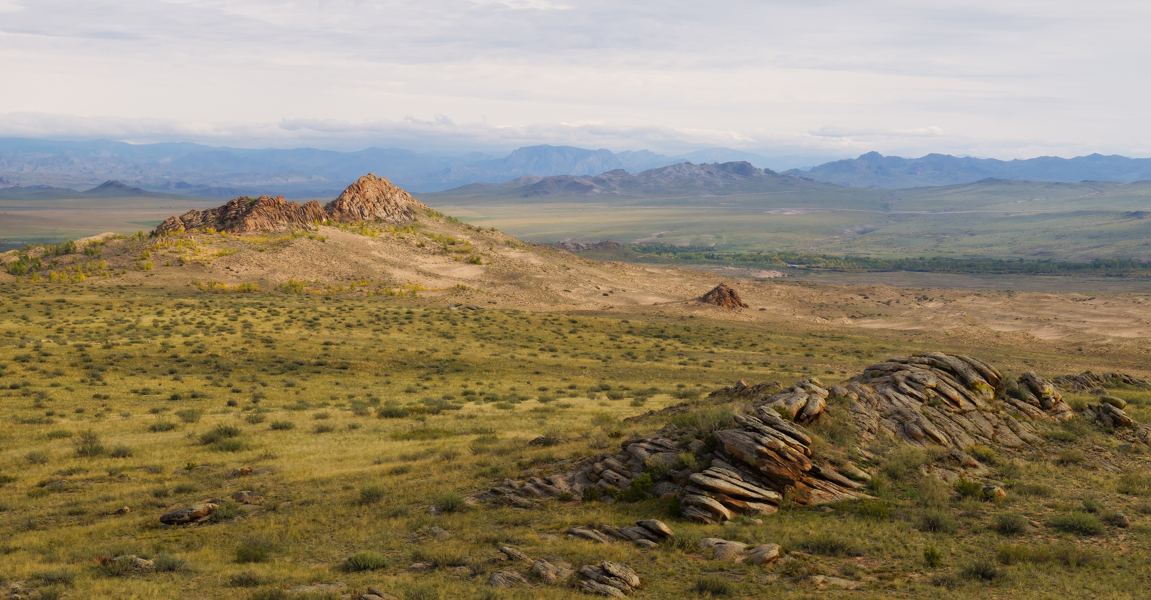 республика Тыва , Заповедник Убсунурская котловина, кластер Цугээр-Элс This image is related to the protected area of Russia number 1700025